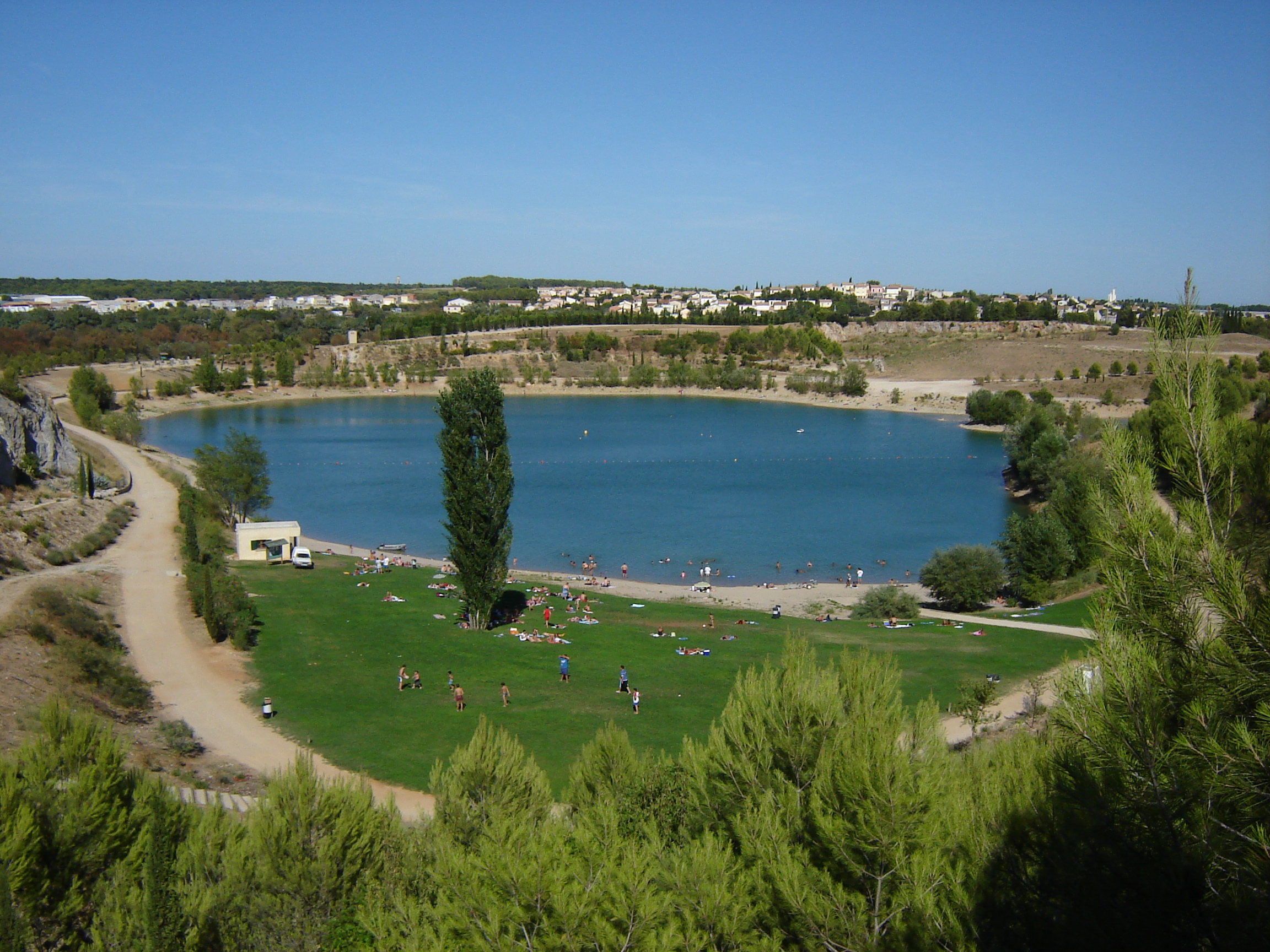 Le lac du Crès en été.